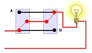 B-korrespondance (el)